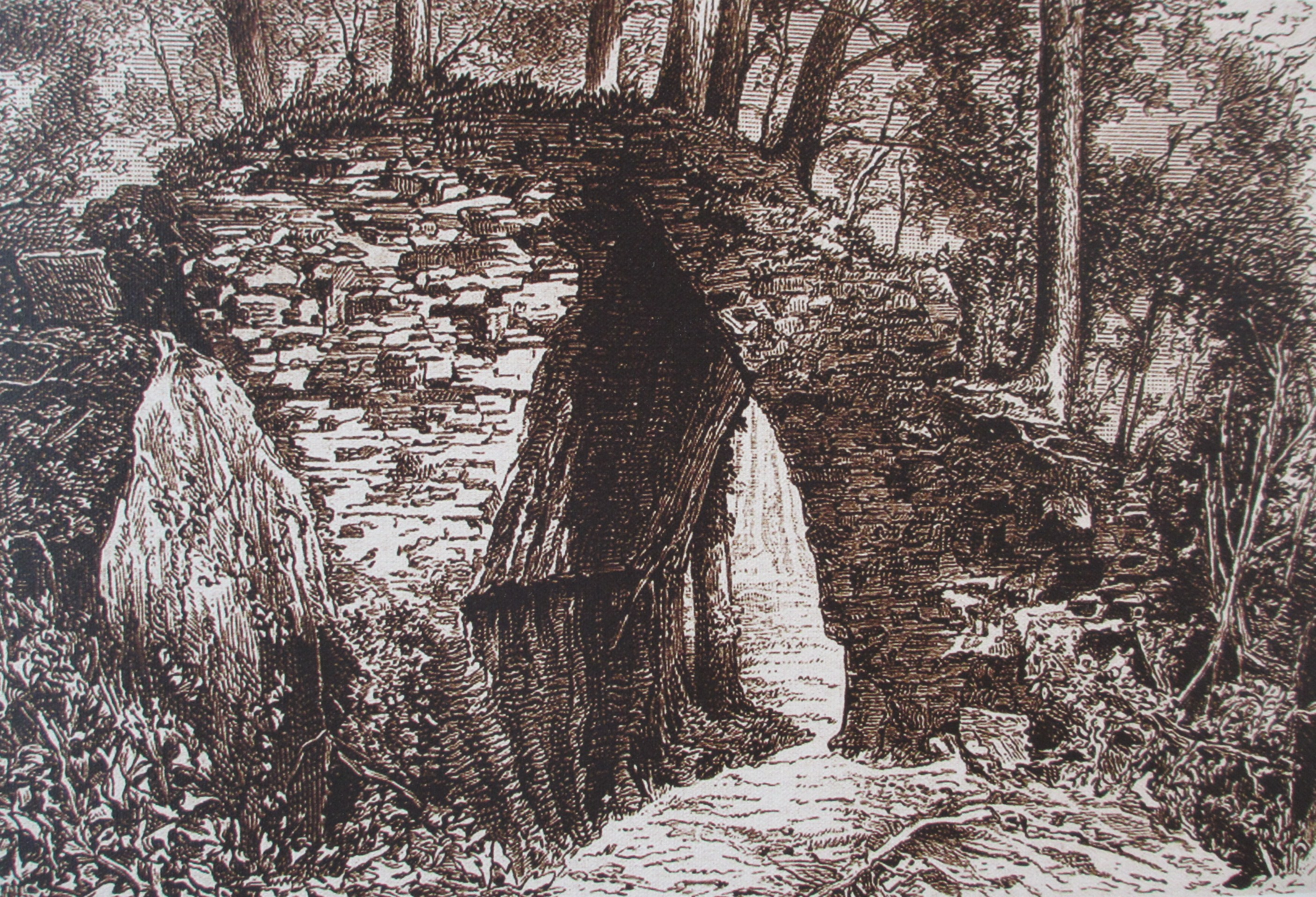 Litografía realzada por el explorador francés Désiré Charnay en el apartado titulado: "Descubrimiento de Comalcalco" . Museo de Sto de la zona arqueológica maya de Comalcalco. Tabasco. México.